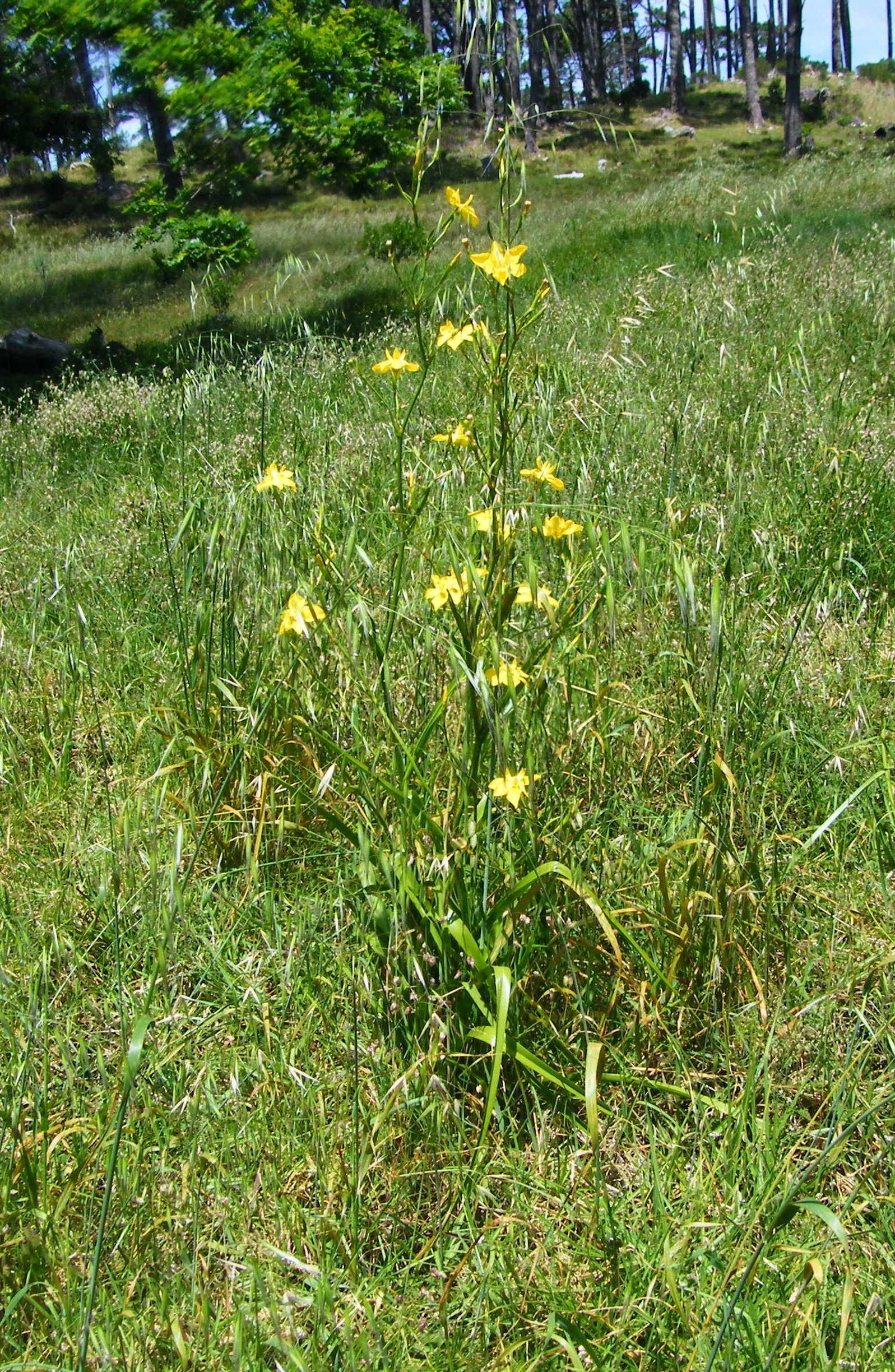 vleiuintjie